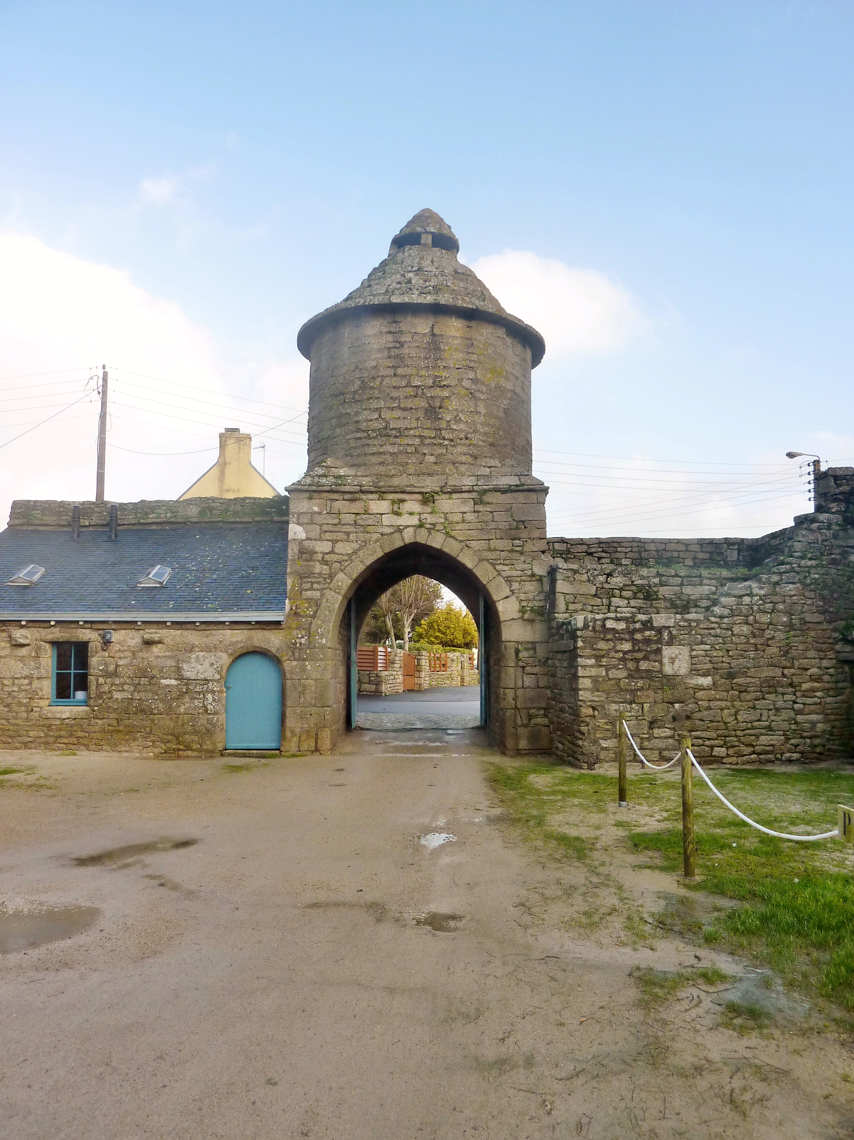 Le Guilvinec : l'entrée du manoir de Kergoz et le pigeonnier